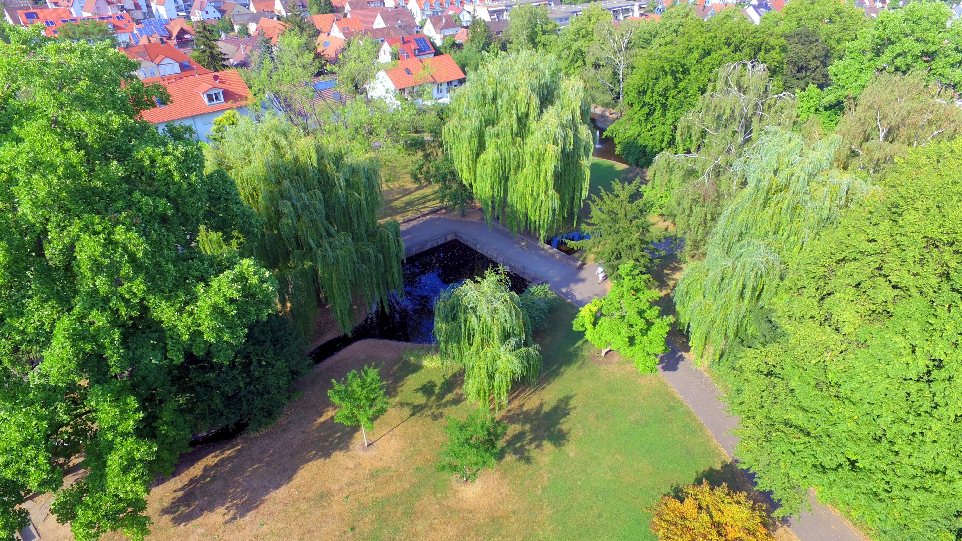 Zeigt die nordöstliche Ecke des Stadtgartens